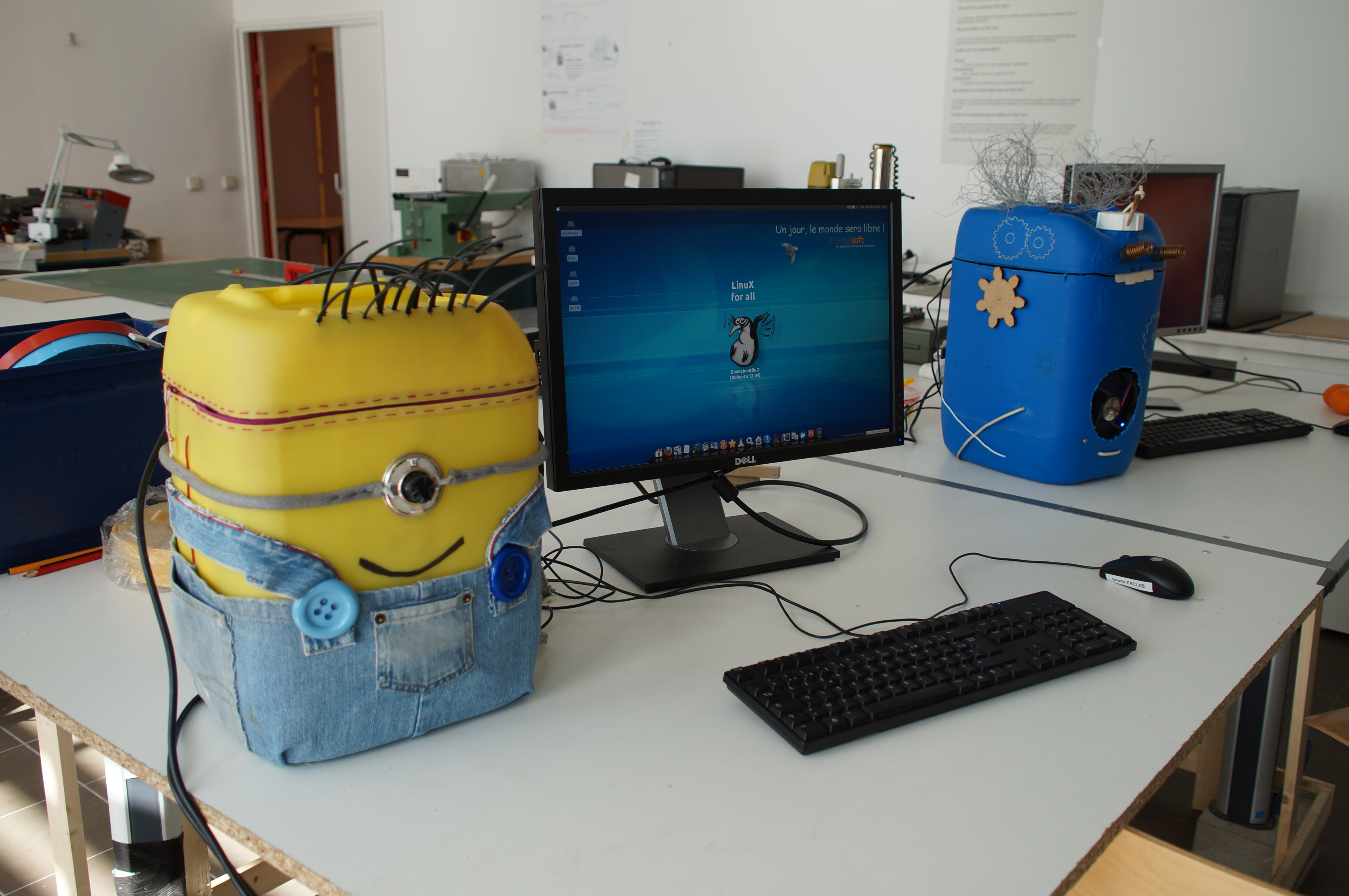 Jerrys sous Emmabuntüs lors de l'anniversaire des deux ans du FacLab de Gennevilliers (France).